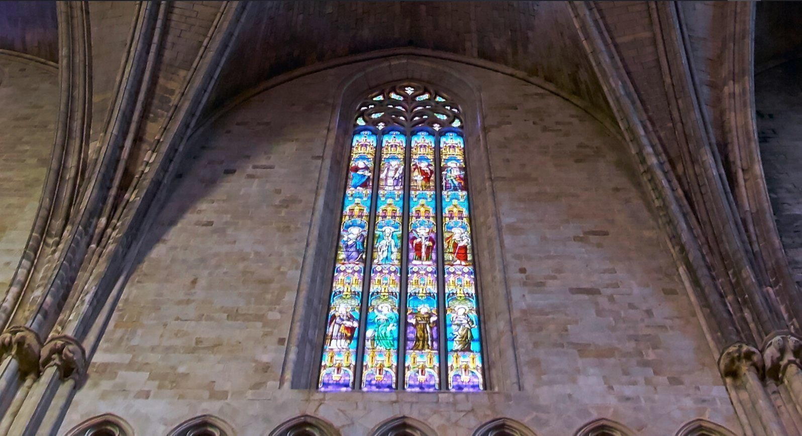 Vidriera norte superior de la Catedral de Girona, mide casi 14 metros de alto por 3 metros de ancho.